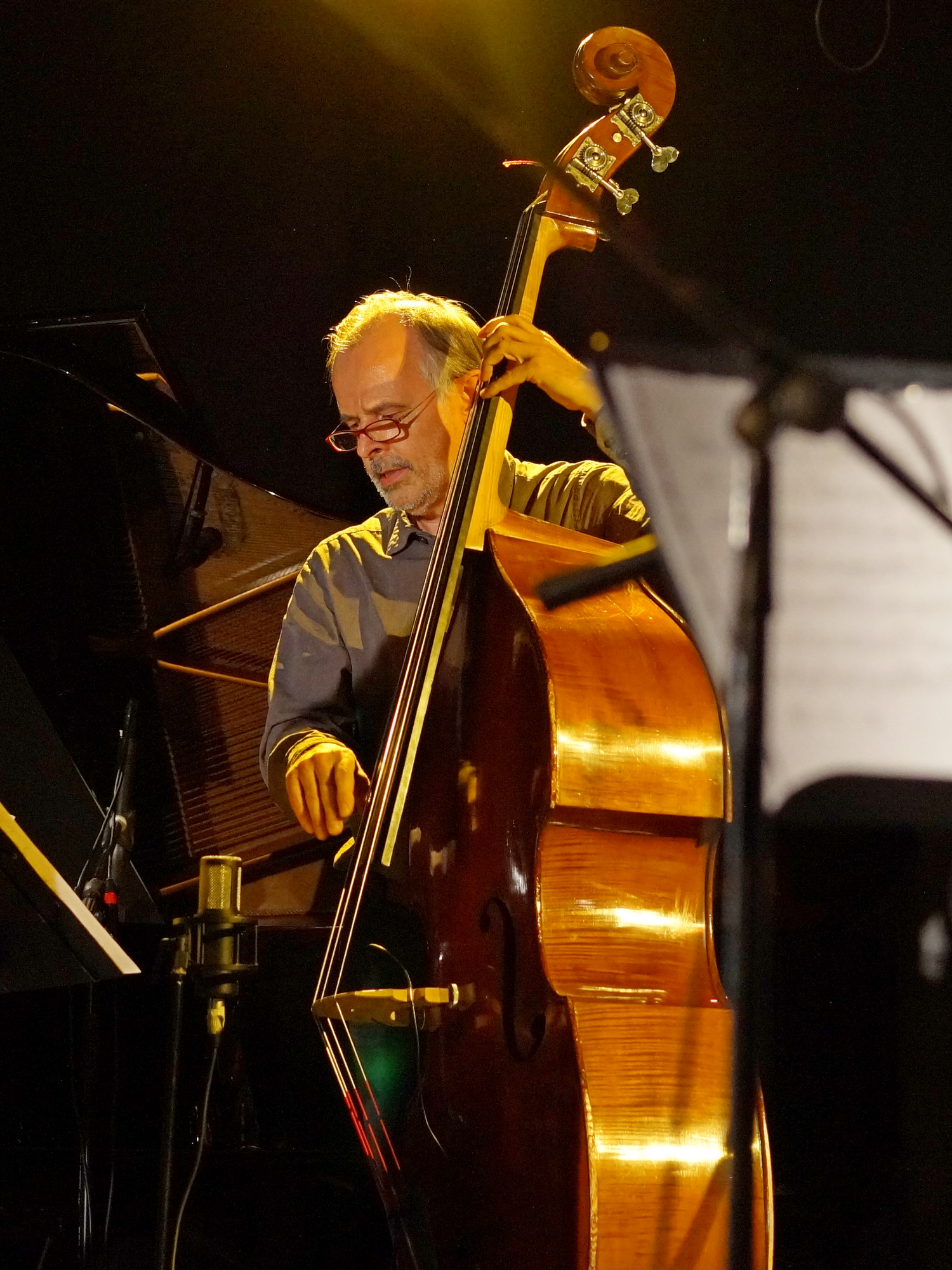 Andrzej Łukasik podczas koncertu ŚWIĄTECZNA ŚMIETANKA ŁOWICKA – "Straszni Panowie Trzej", Warszawa, Centrum Łowicka 27 grudnia 2014.